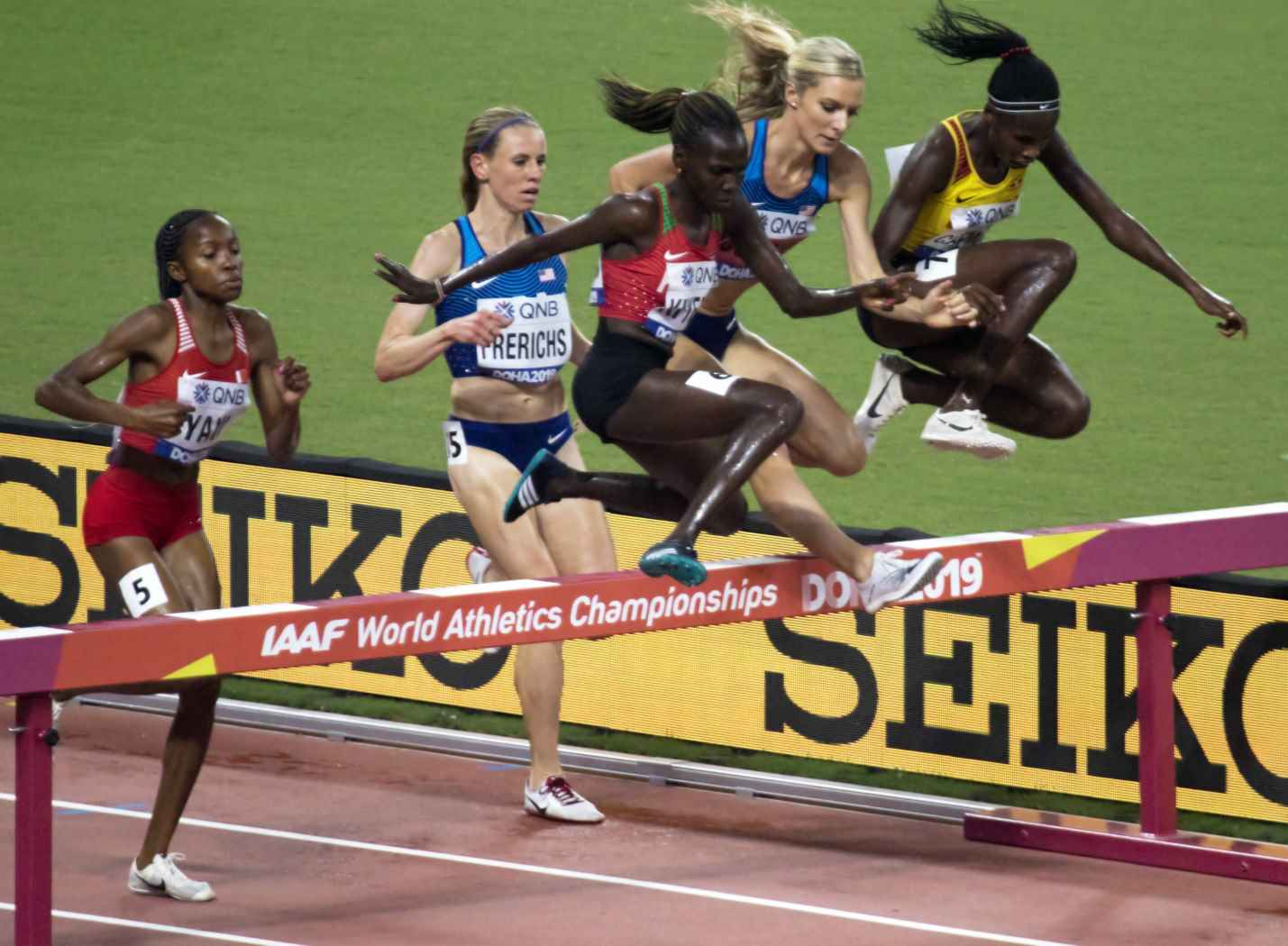 DOH40184 3000mst women final